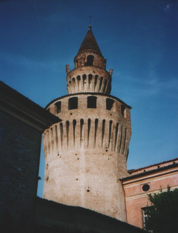 Castello di Rivalta, in provincia di Piacenza. Particolare della Torre.